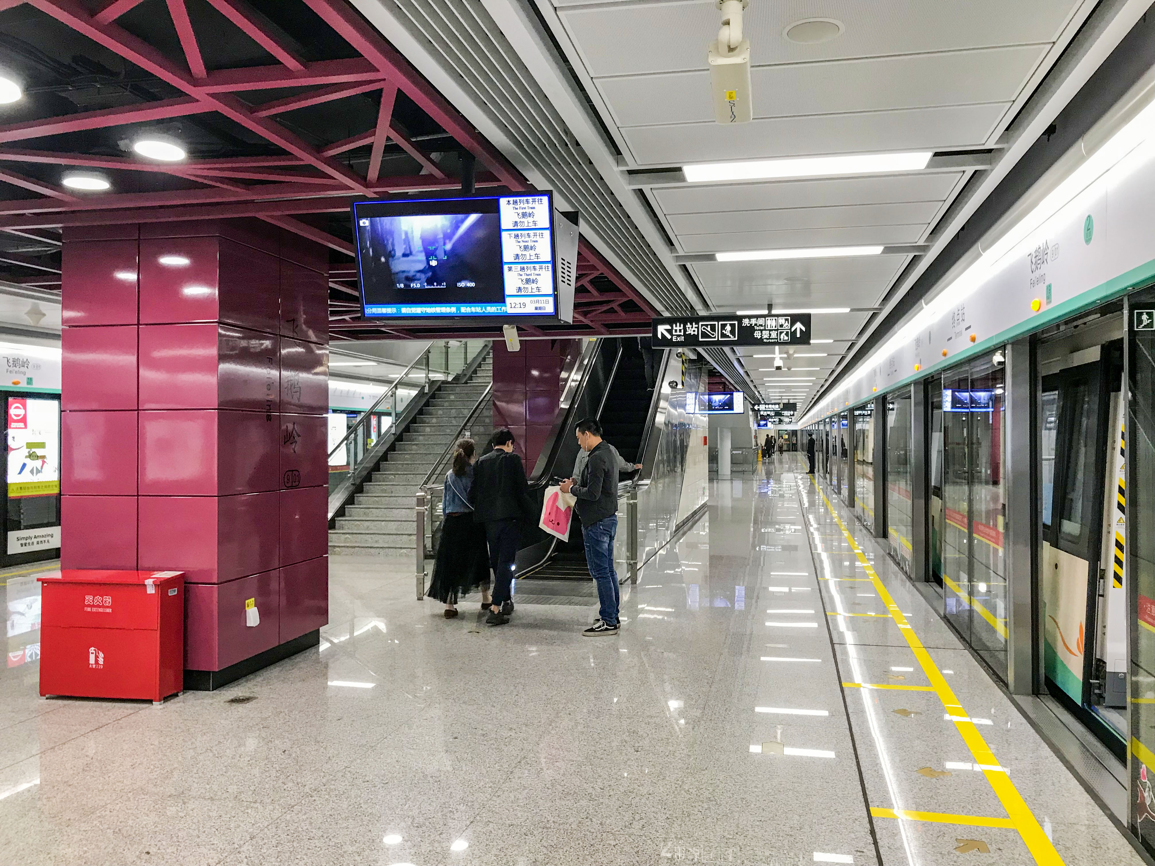 广州地铁飞鹅岭站